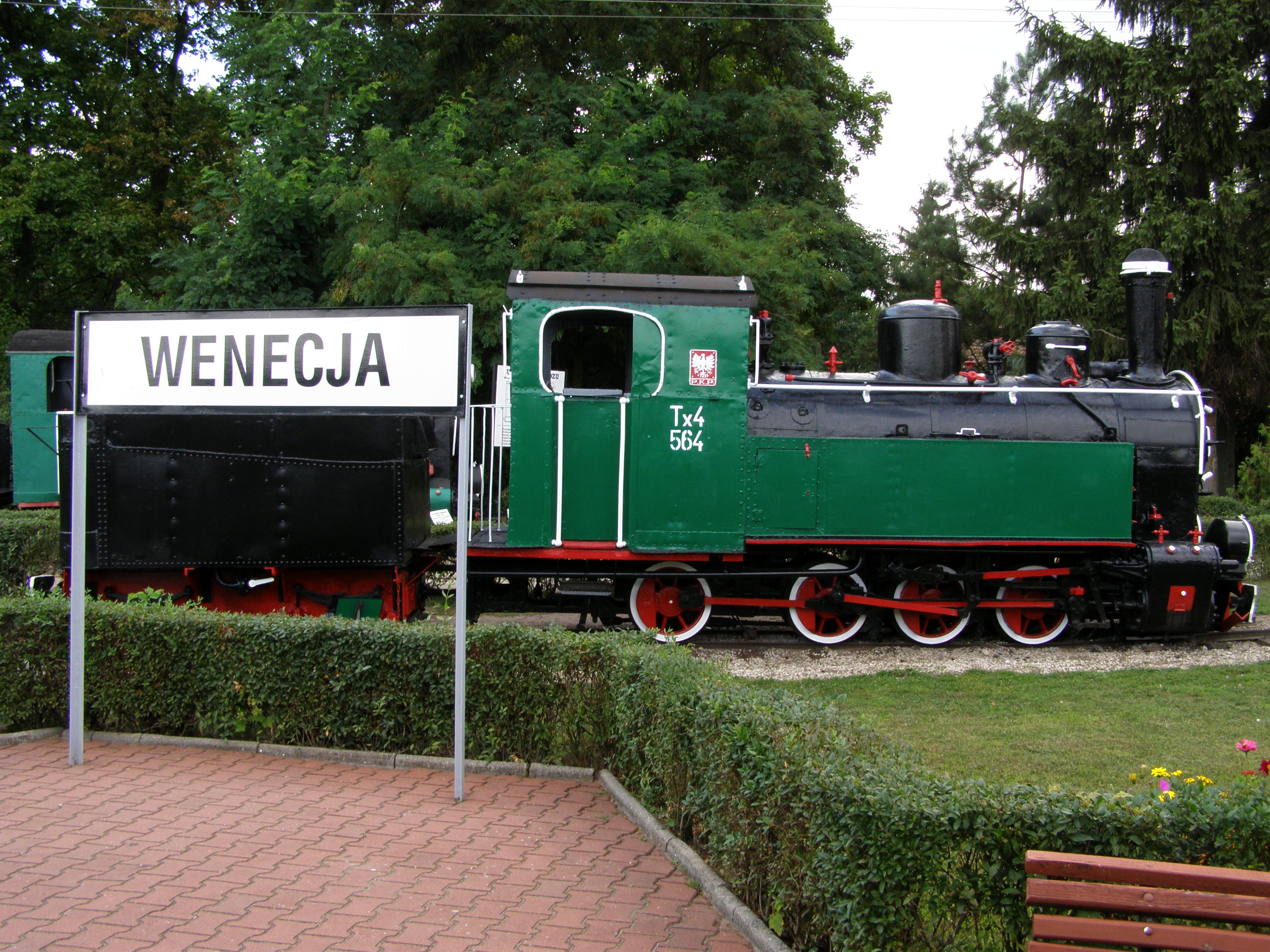 Lokomotywa Tx4-564 (szerokość toru 600 mm, producent Hanomag, 1923, nr fabr. 10205). Muzeum Kolei Wąskotorowej w Wenecji